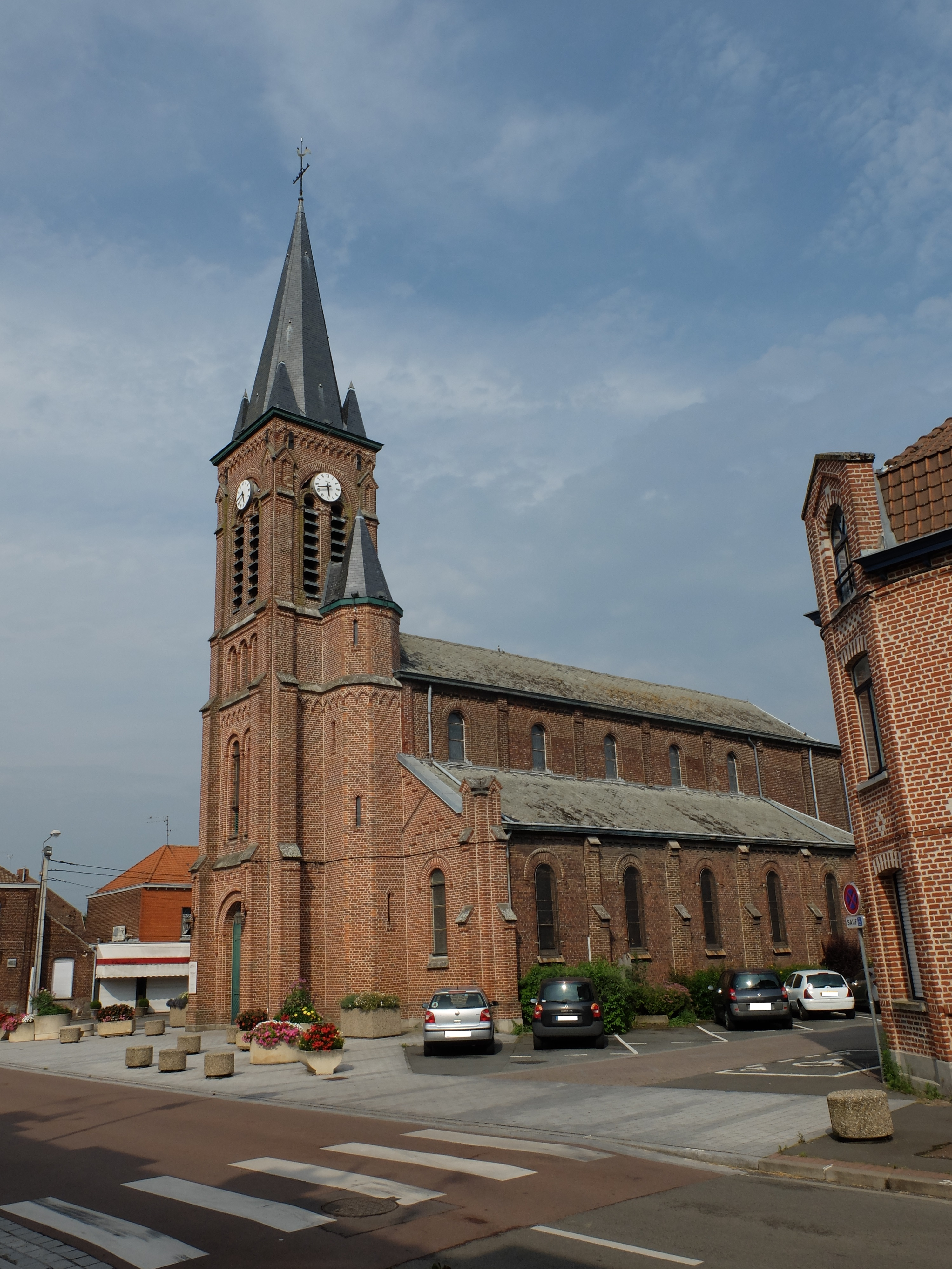 Vue de l'église Saint-Jean-Baptiste de Forest-sur-Marque.